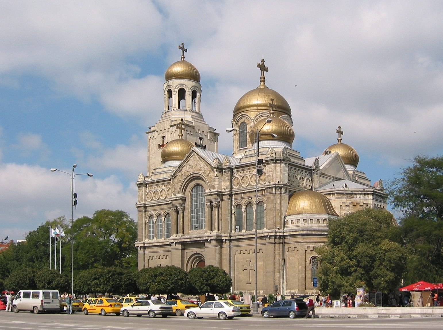 Varna, la Cathédrale orthodoxe. Photo prise par Harrieta171 le 29/09/04